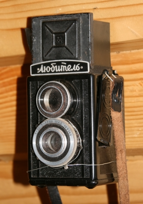 Lubitel camera